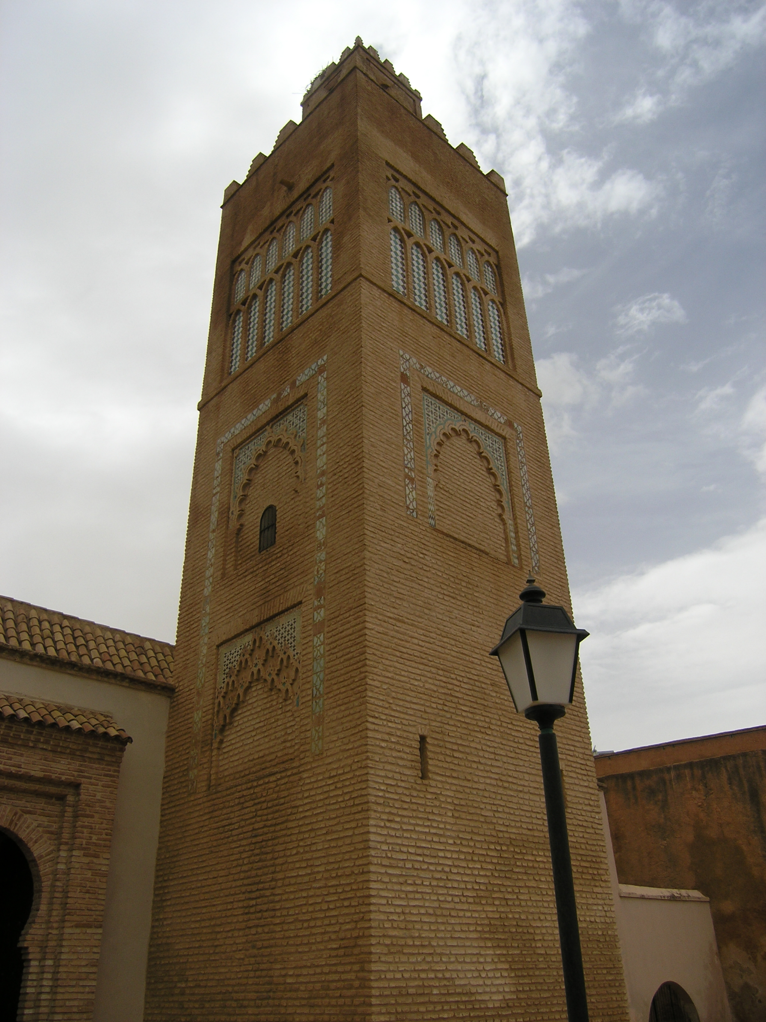 Mosquée du Mechouar